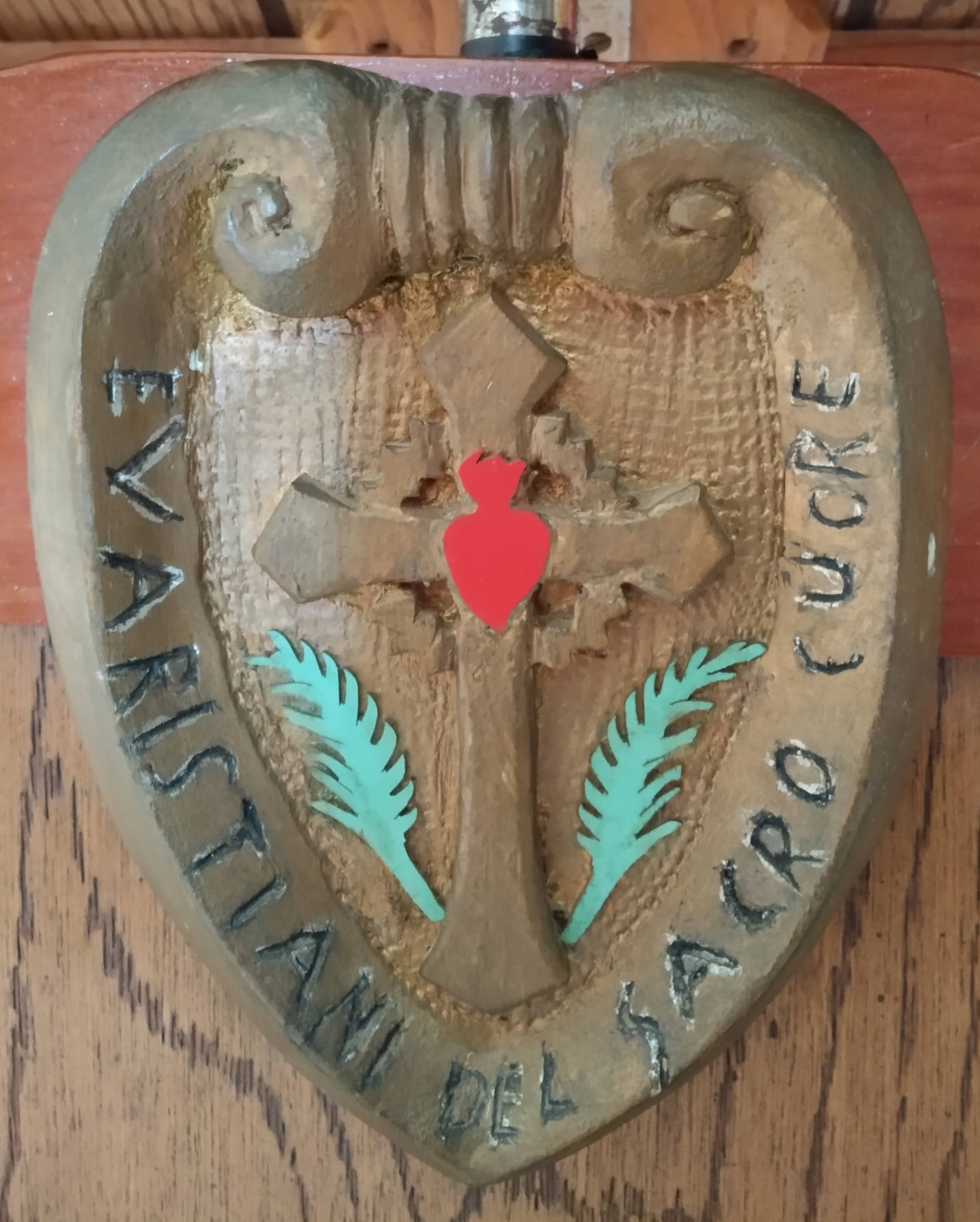 Stemma Evaristiani del Sacro Cuore, inciso nell'ambone della casa madre in Donigala Fenughedu (Oristano)